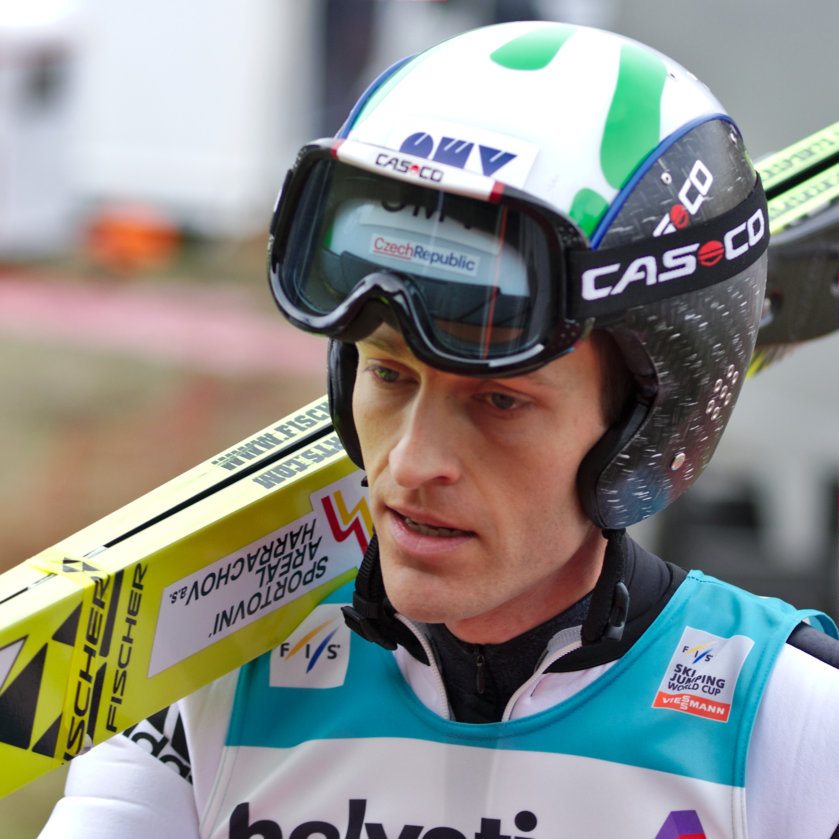 FIS Ski Jumping World Cup 2014 - Engelberg - 20141221 - Jan Matura